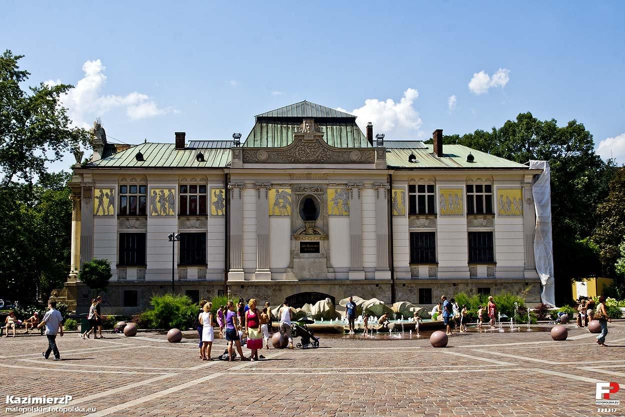 Podobno dzisiaj w środę 8 sierpnia ciężarówka wjechała w fontannę i ją uszkodziła!